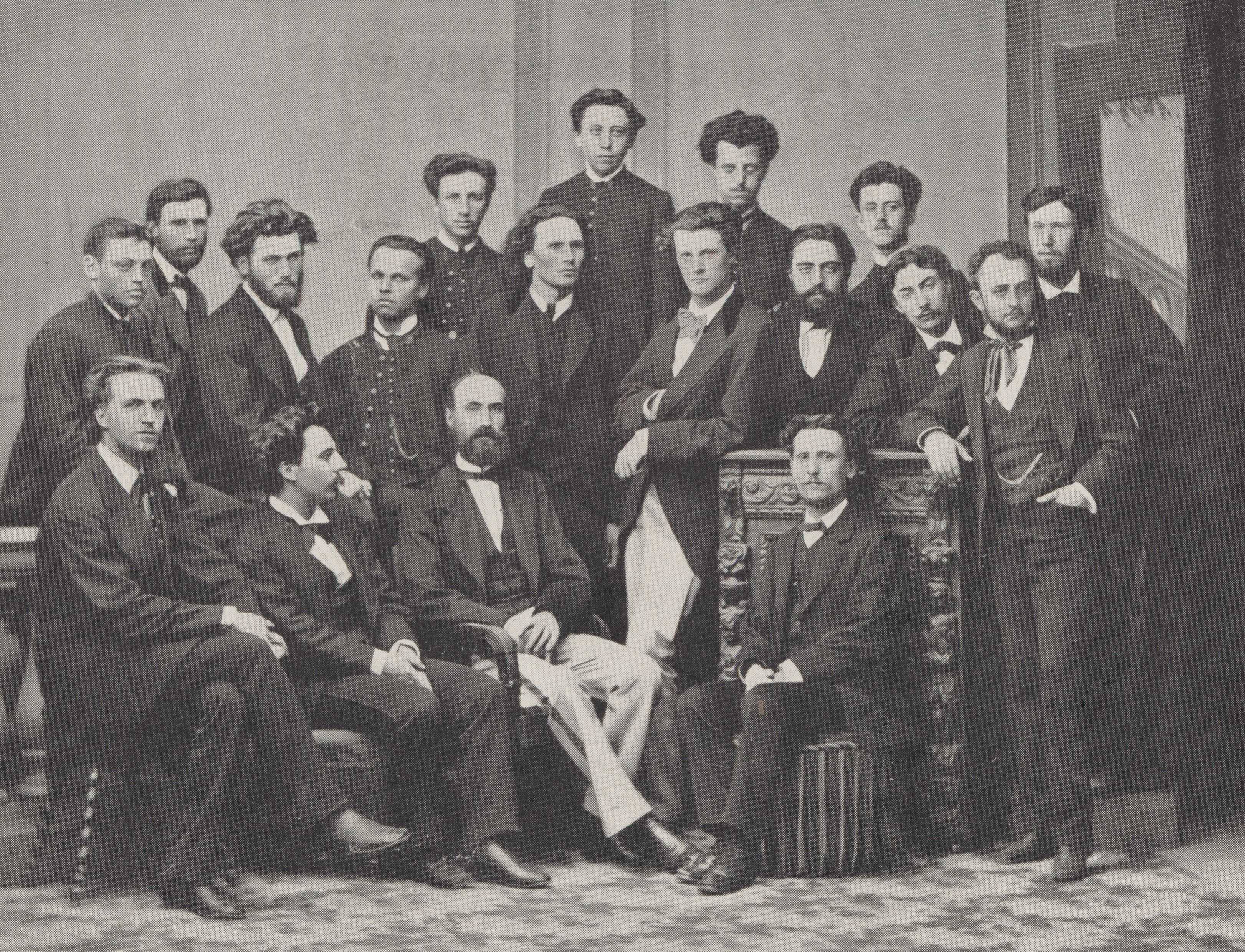 photographie de groupe d'enseignants et d'élèves de l'Ecole Niedermeyer de Paris, avec Gabriel Fauré, Gustave Lefèvre, Eugène Gigout, André Messager...